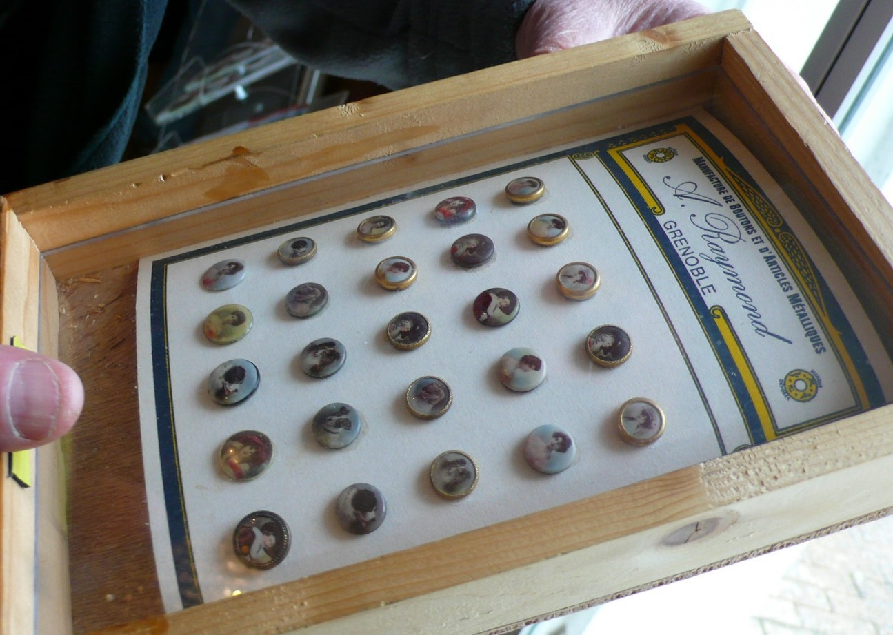 Planche présentoir de boutons-pression en ivoire végétal (coroso) imprimés de portraits, de reproductions de miniatures, très à la mode vers 1900.